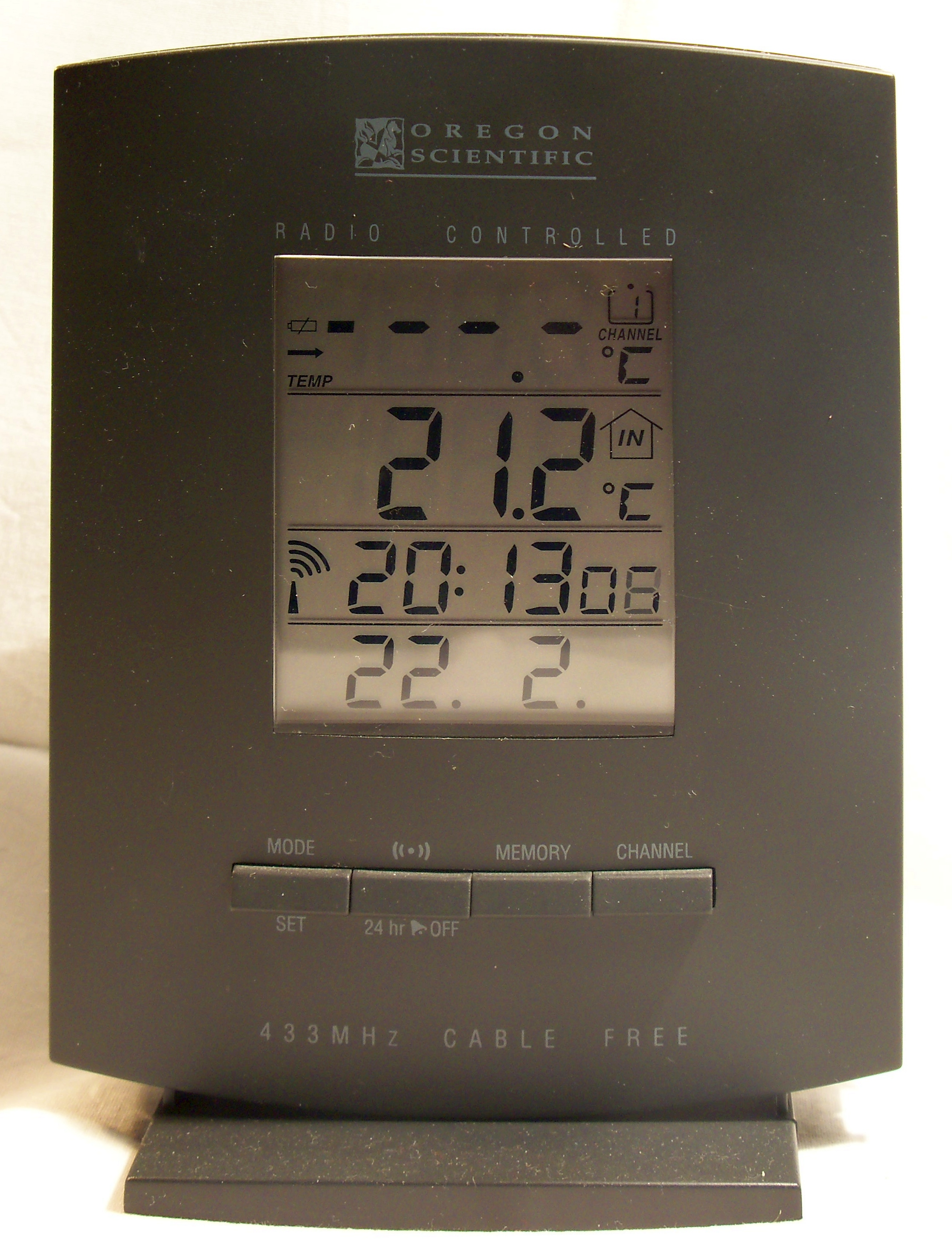 Eine Digitale Wetterstation mit verschiedenen Sonderfunktionen und keinem Empfang zum Außenempfänger